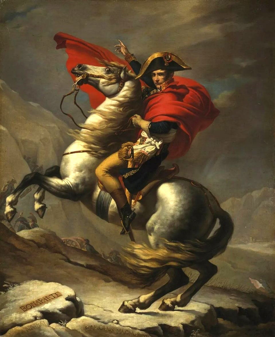 Anonyme, Atelier de David 1805, Bonaparte franchissant le Grand Saint Bernard Tokyo Fuji Art Museum